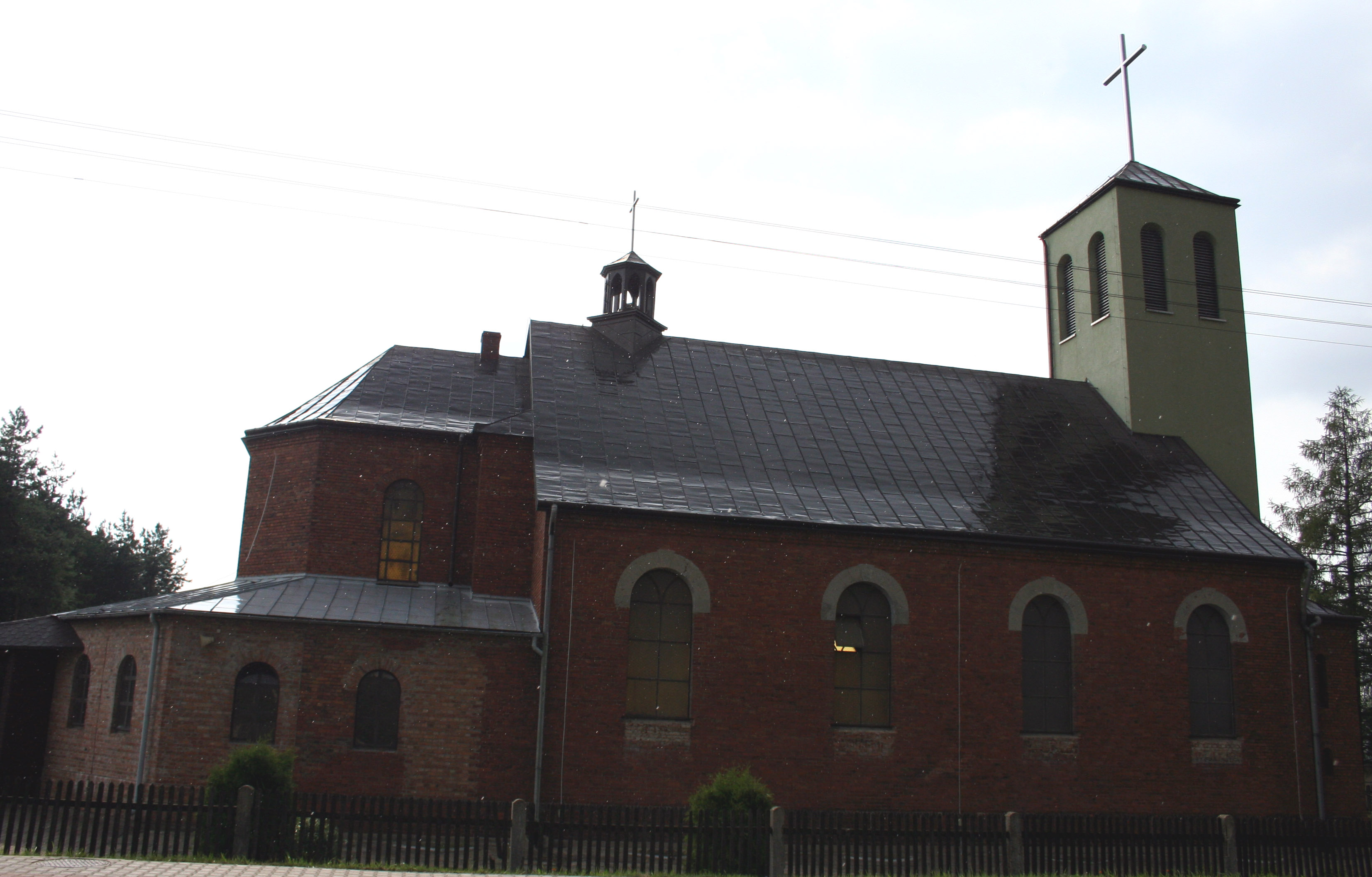 Kościół Najświętszego Serca Pana Jezusa w Herbach, powiat lubliniecki